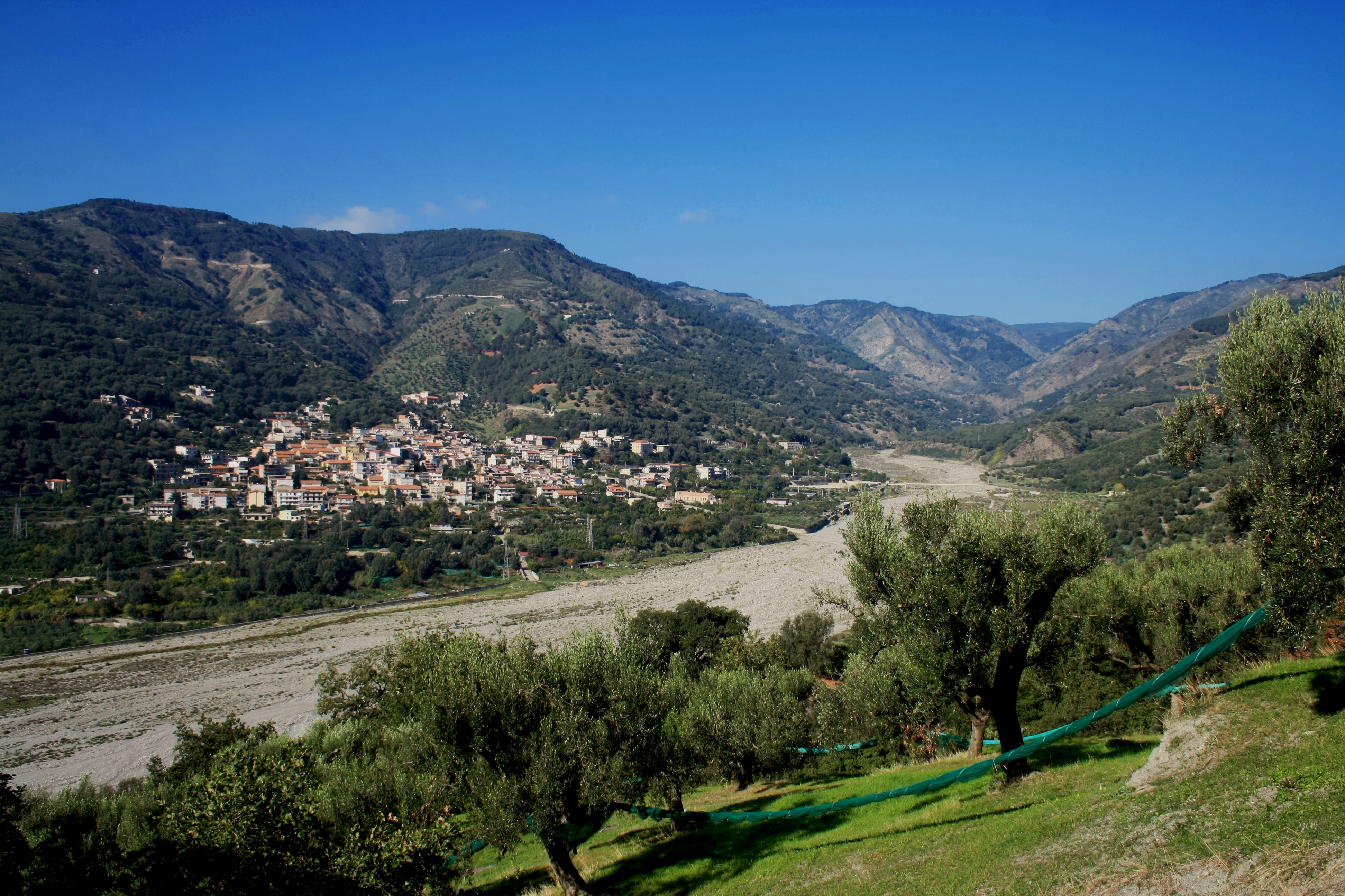 Centro abitato di Bagaladi e la fimuara Melito - Calabria (Italy)